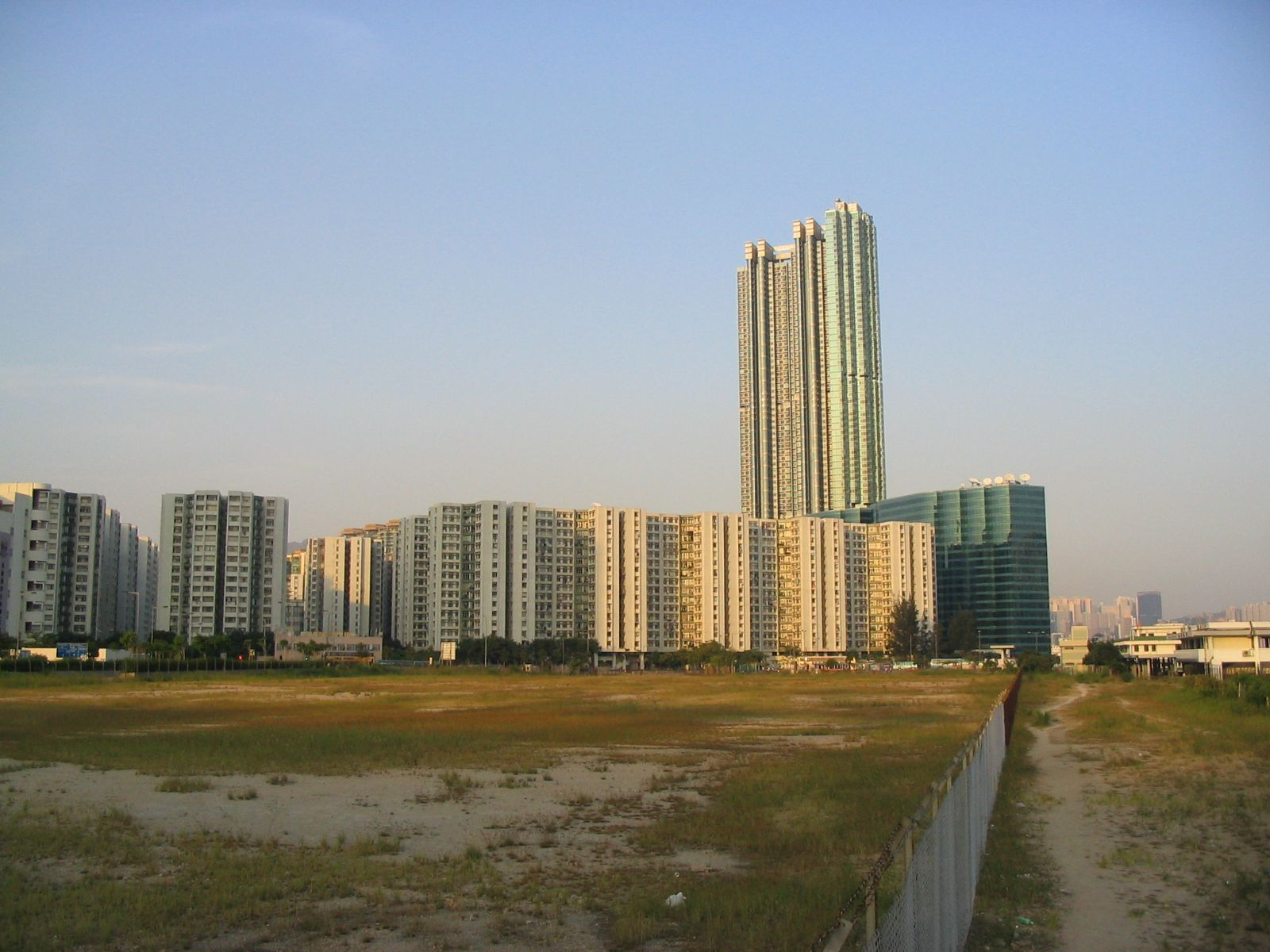 黃埔花園/紅磡灣一帶 Whampoa Garden / Hung Hom Bay